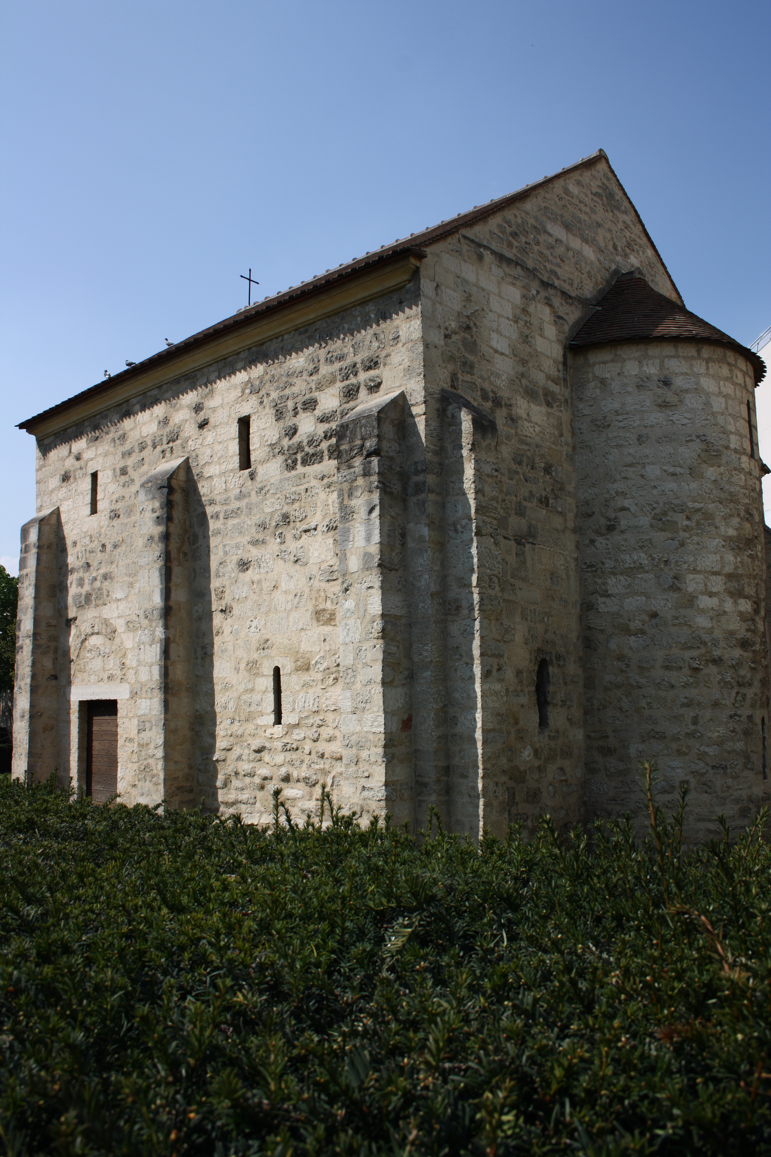 Romanische Kapelle St-Jean-Baptiste in Argenteuil im Département Val-d’Oise (Île-de-France/Frankreich)